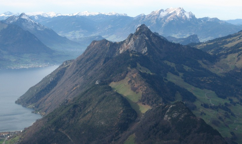 Hochflue von Osten mit Vierwaldstättersee, links und rechts dahinter Pilatus